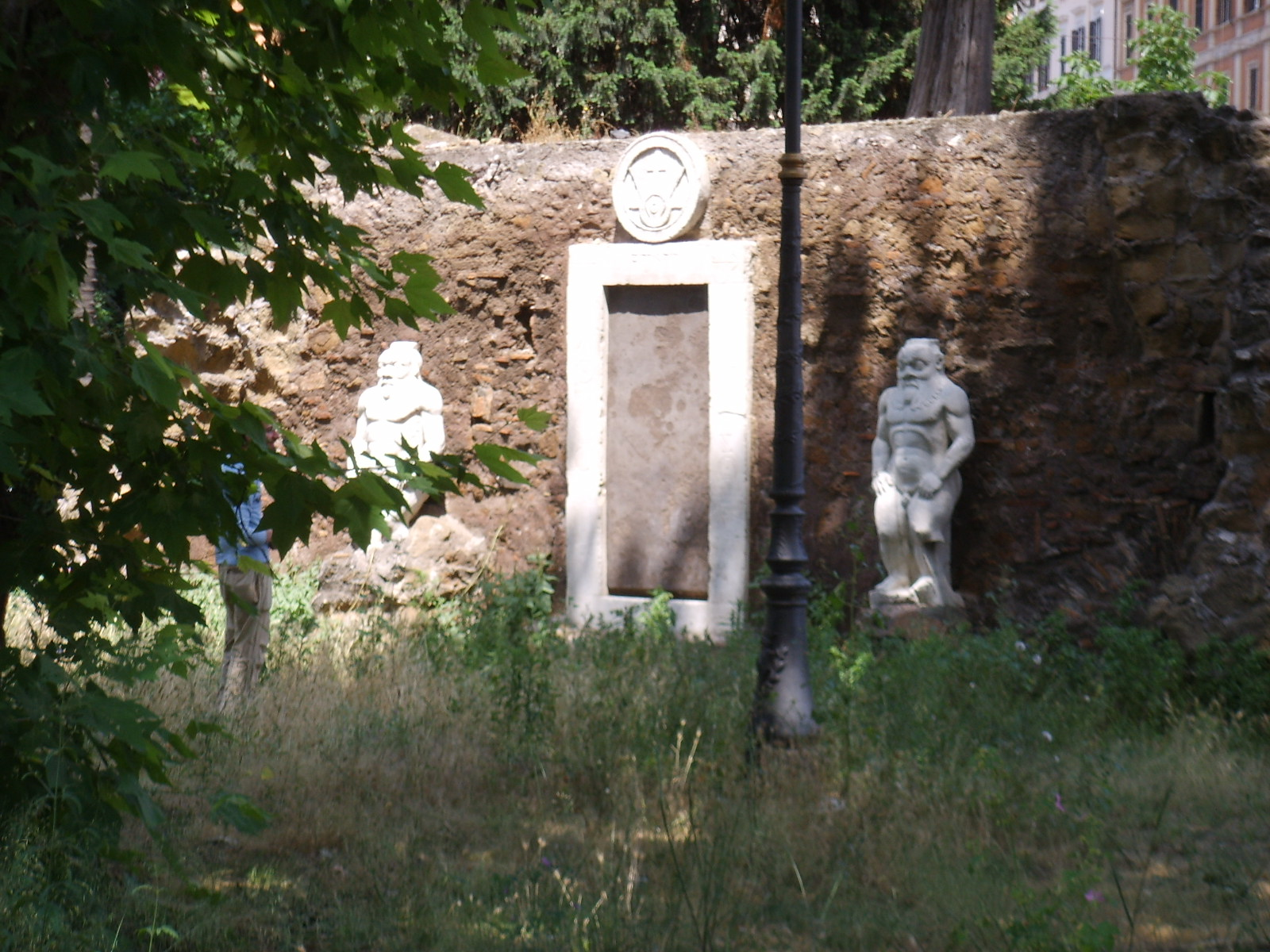 Magic gate (Porta magica) in Piazza Vittorio Emanuele, in Rome, Italy